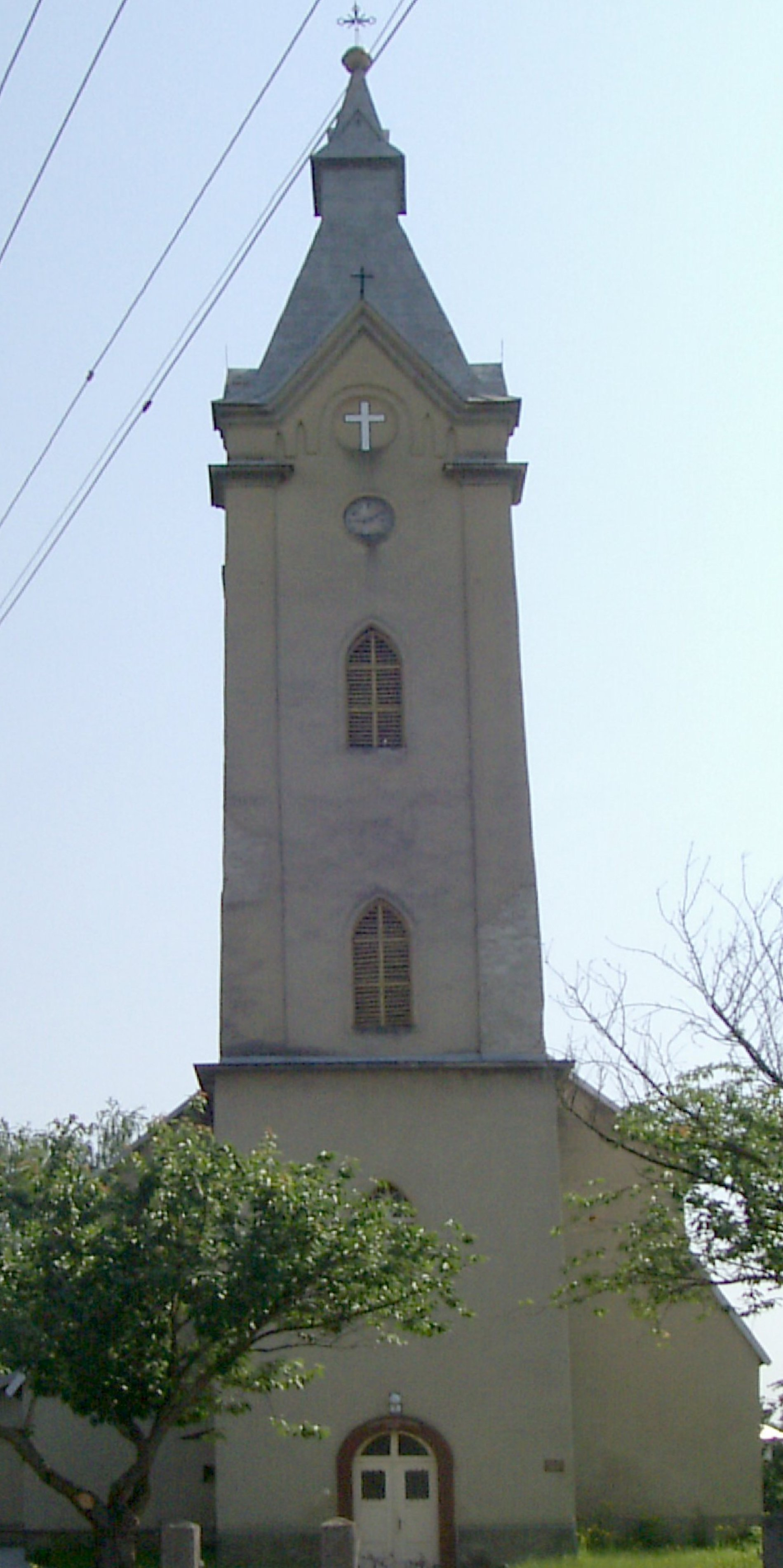 Dlhé nad Cirochou, Rímskokatolícky kostol Svätá Anna